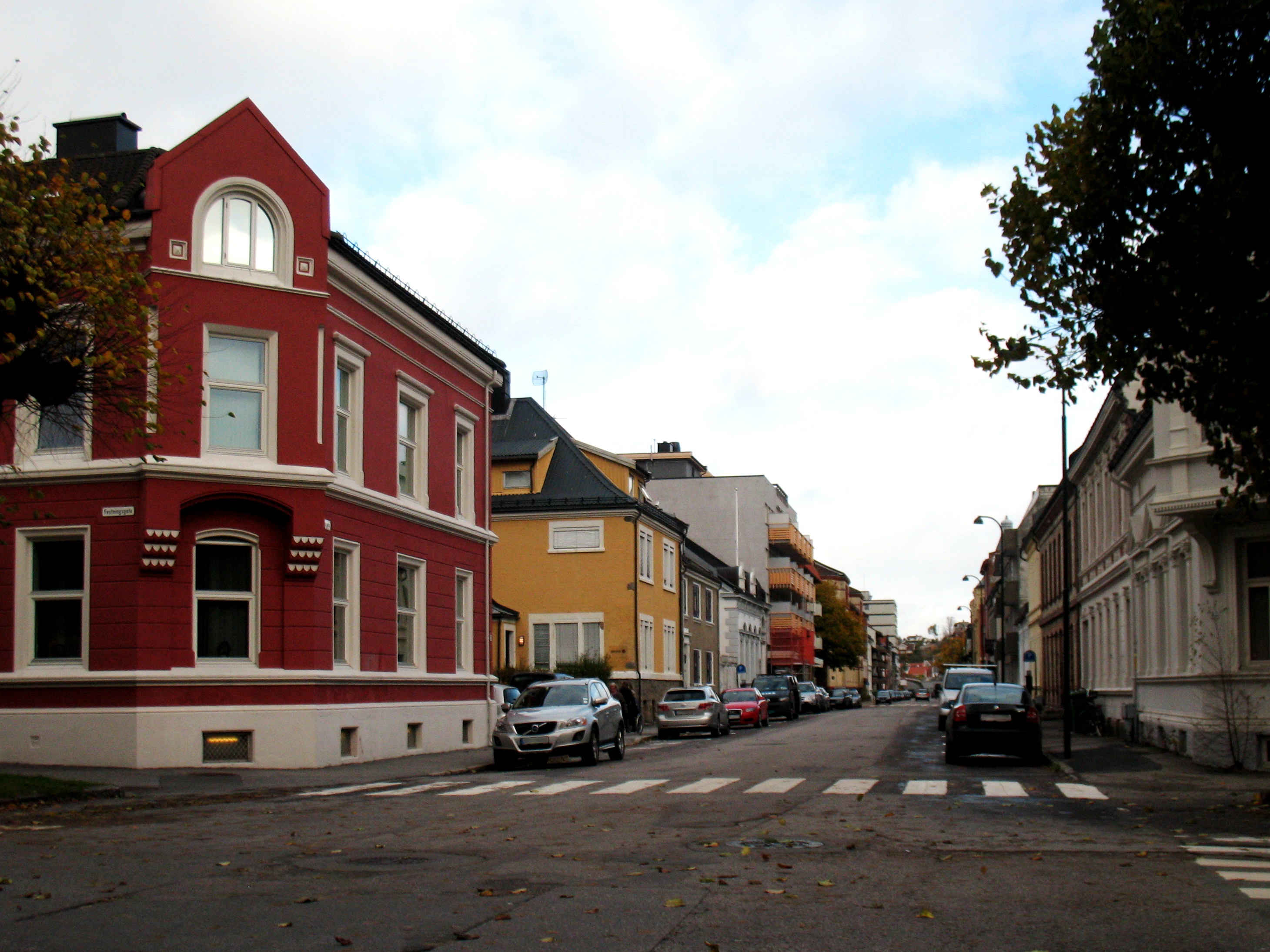 Kongens gate fra krysset med Festningsgata i Murbyen, bydelen Kvadraturen / Eg i Kristiansand.